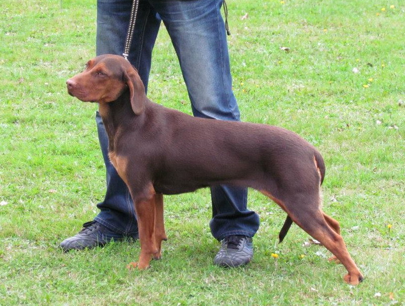 Стандартный цвет окраса польской гончей - шоколадный с подпалом.